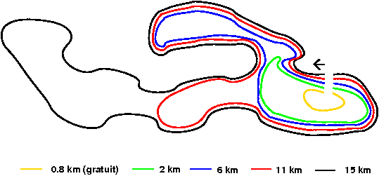 plan des pistes de ski de fond de Gresse en Vercors, schématique, simplifié, et pas exactement à mesure